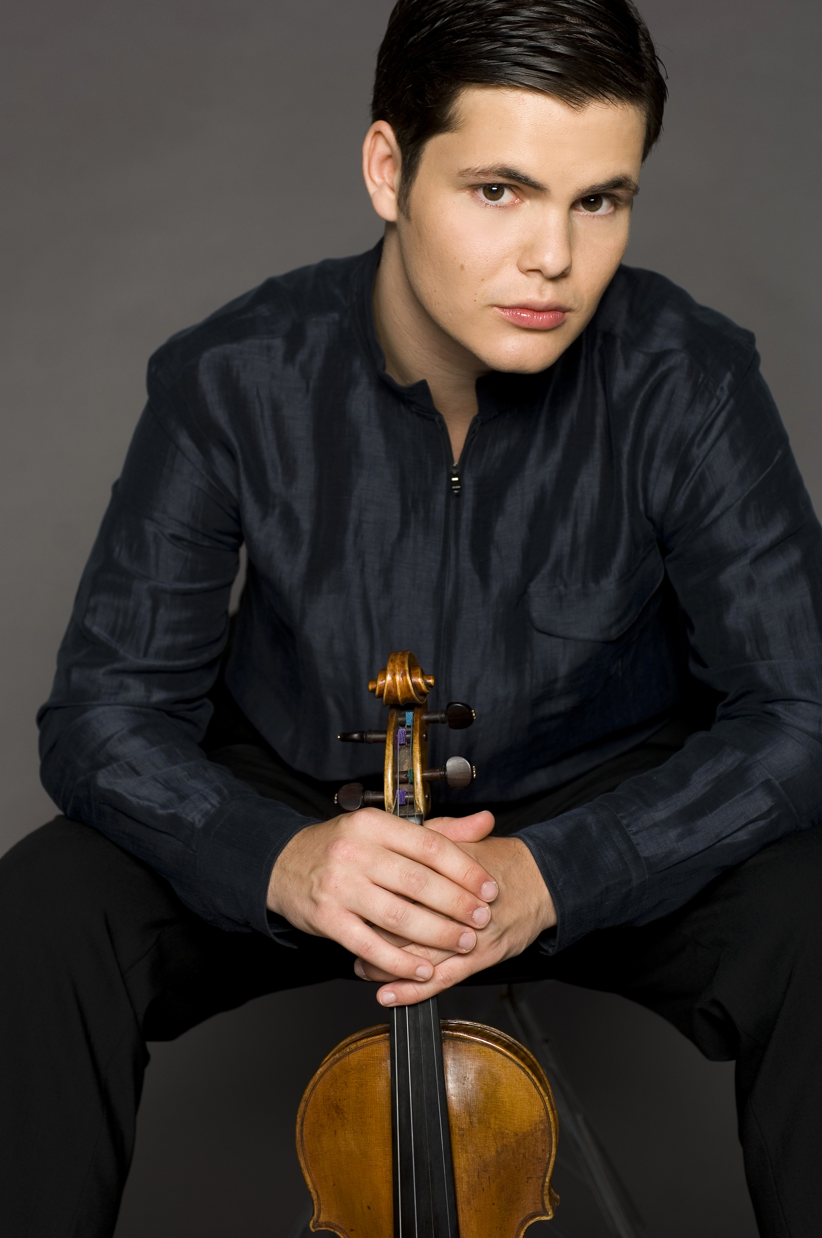 Alexander Gilman, Violinist